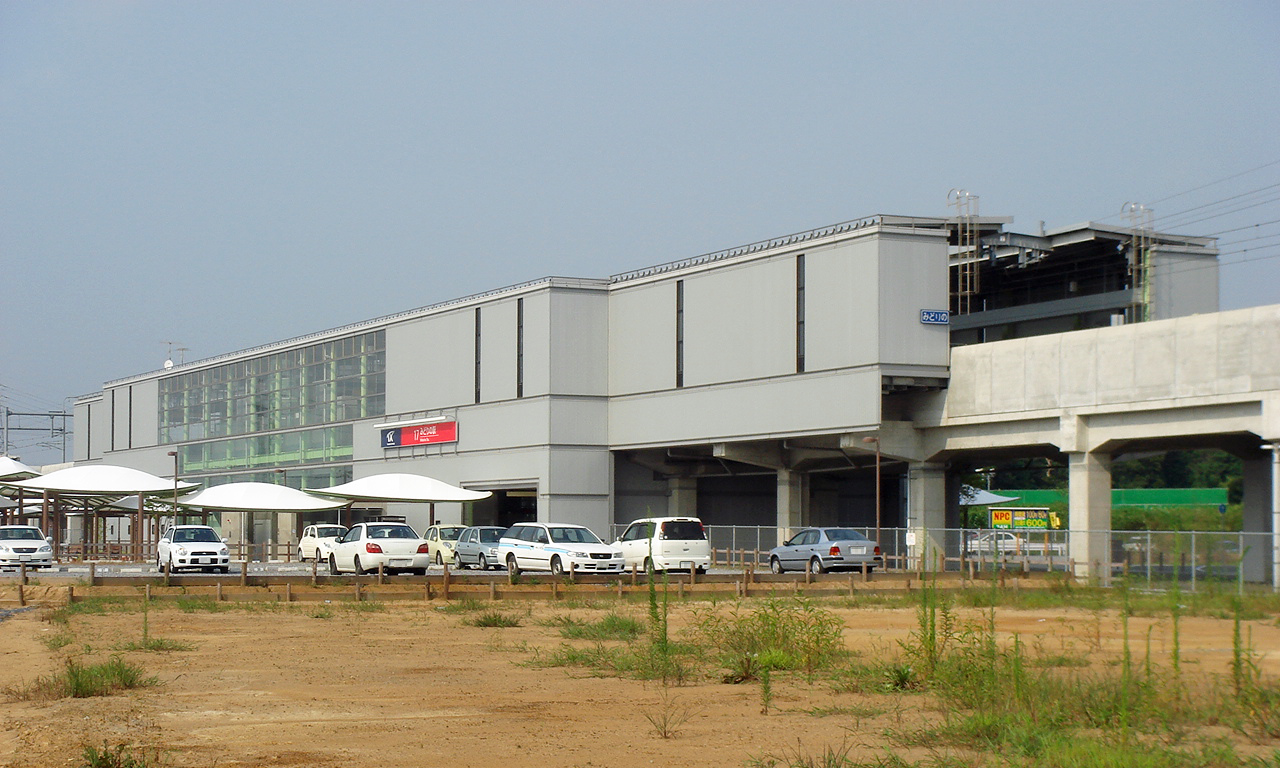 つくばエクスプレスみどりの駅